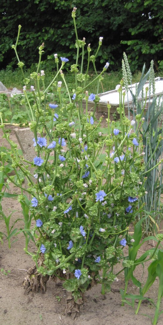 zelfgemaakte foto van bloeiende andijvie half juni, Rasbak first upload nl.wikipedia 22 jun 2004 09:43 . . Rasbak (186317 bytes) (zelfgemaakte foto van bloeiende andijvie half juni)